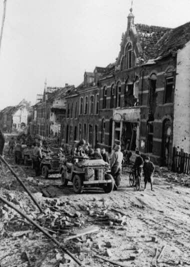 Amerikaanse troepen op de Kaldenkerkerweg bevrijden Venlo